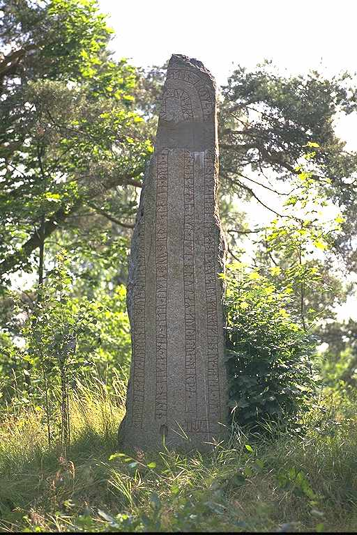 Inskriften börjar: "Östen och Jorund och Björn, de bröderna reste (denna sten efter ..) sten Drums (?), sin fader. Gud hjälpe hans ande och själ, tillgive honom brott och synder." Därefter följer en vers om minnesmärket.